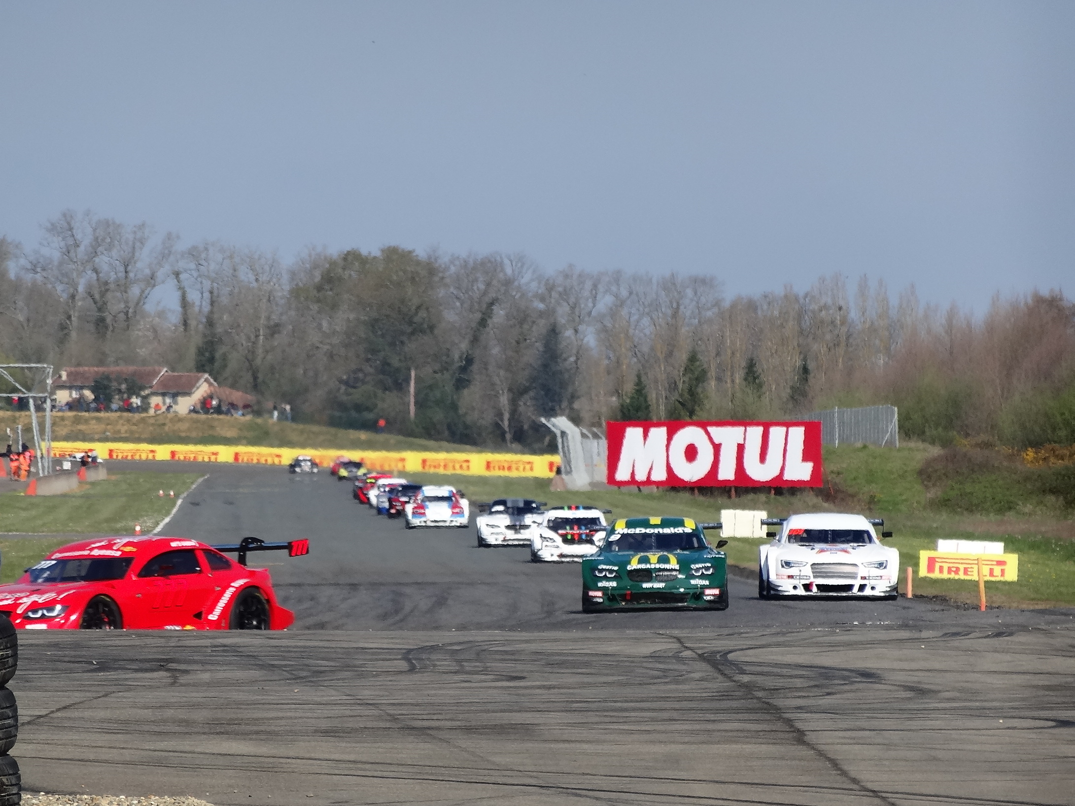 Ligne droite de l'Aérodrome du Circuit Paul Armagnac, lors de la course 1 du championnat de France de Supertourisme